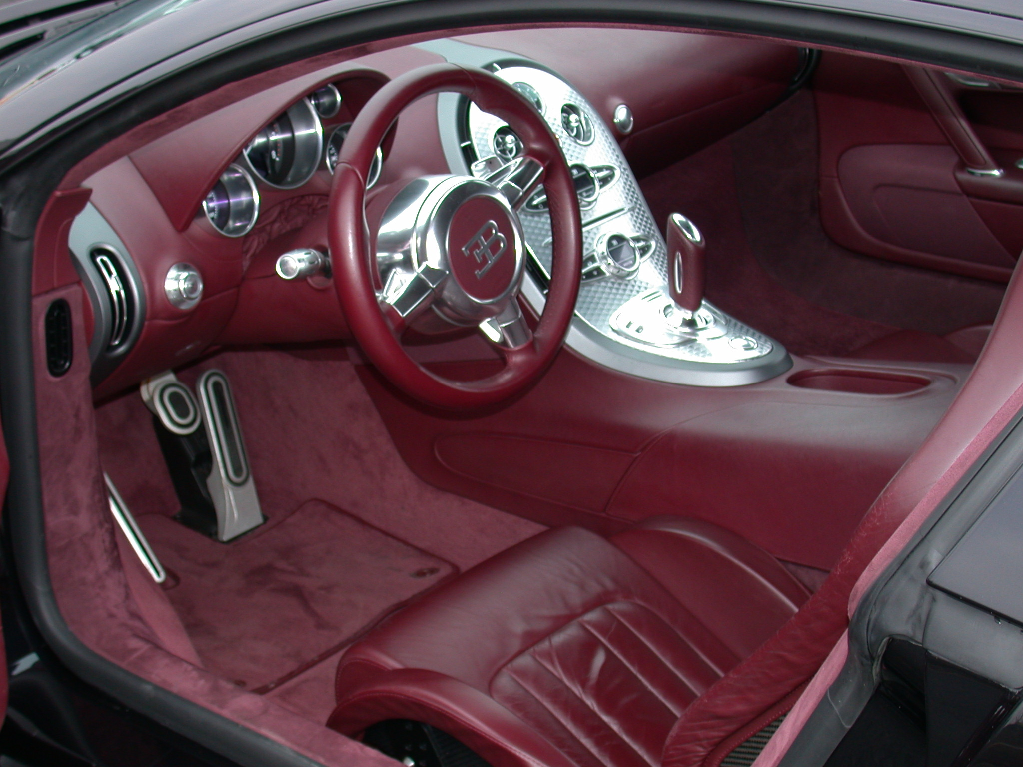 Innenraum des Bugatti Veyron 16.4